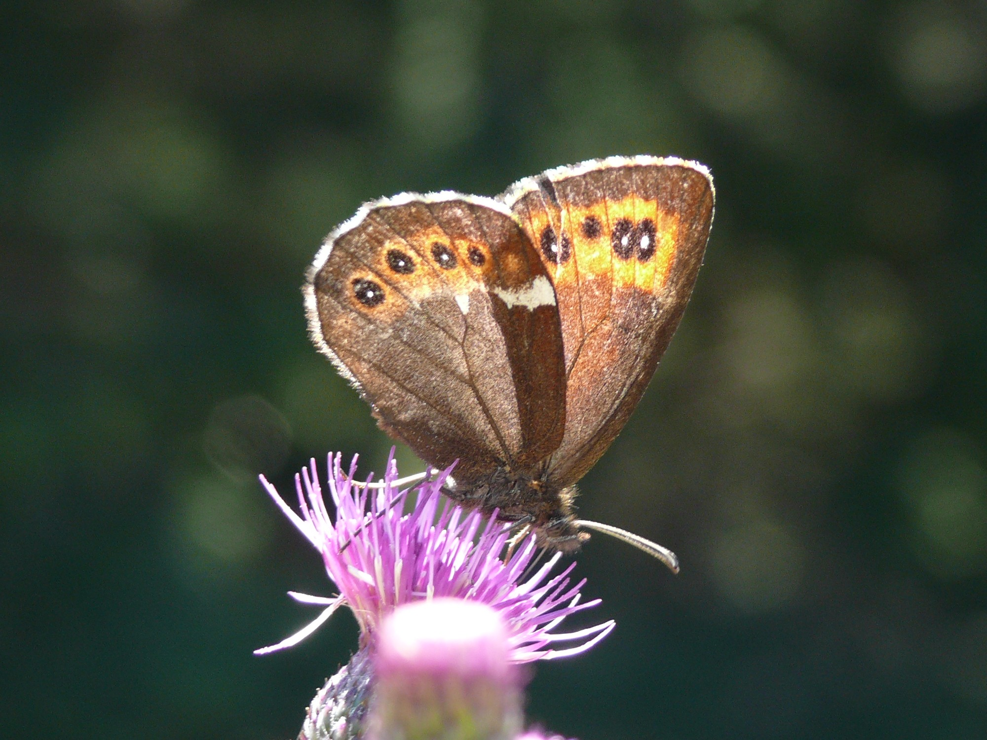 Erebia ligea